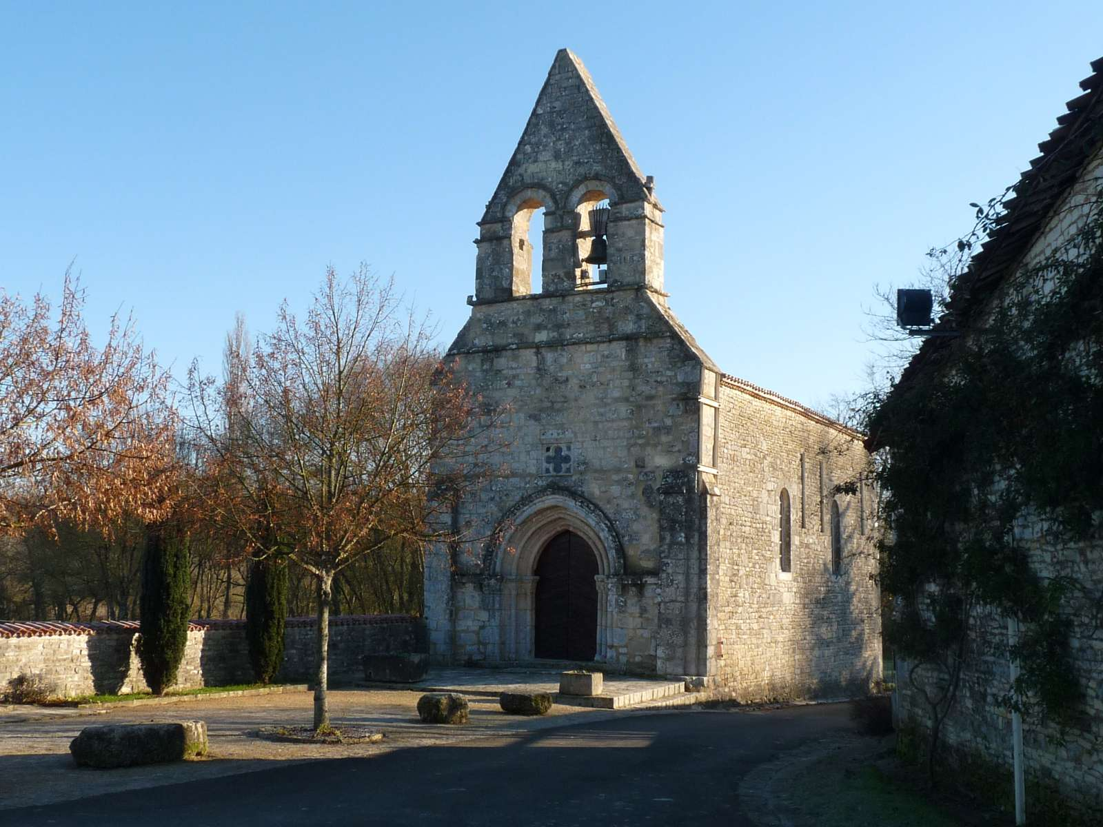 église de St-Groux, Charente, France